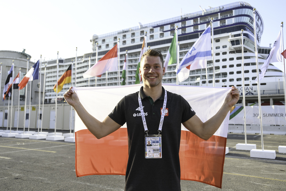 Maciej Hołub z flagą podczas Uniwersjady w Neapolu